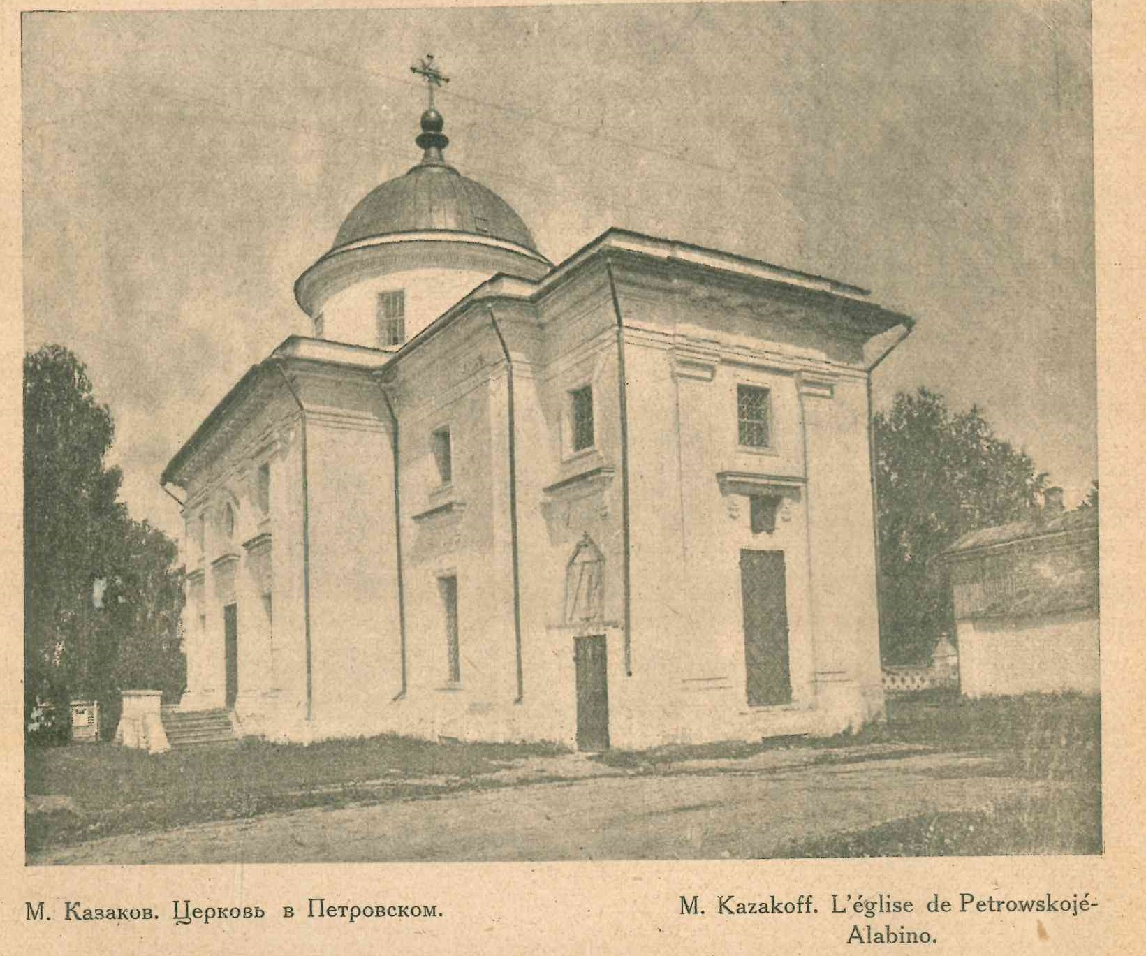 Церковь Петра Митрополита в селе Петровское Наро-Фоминского района Московской области. Архитектор М. Казаков (1738-1812)